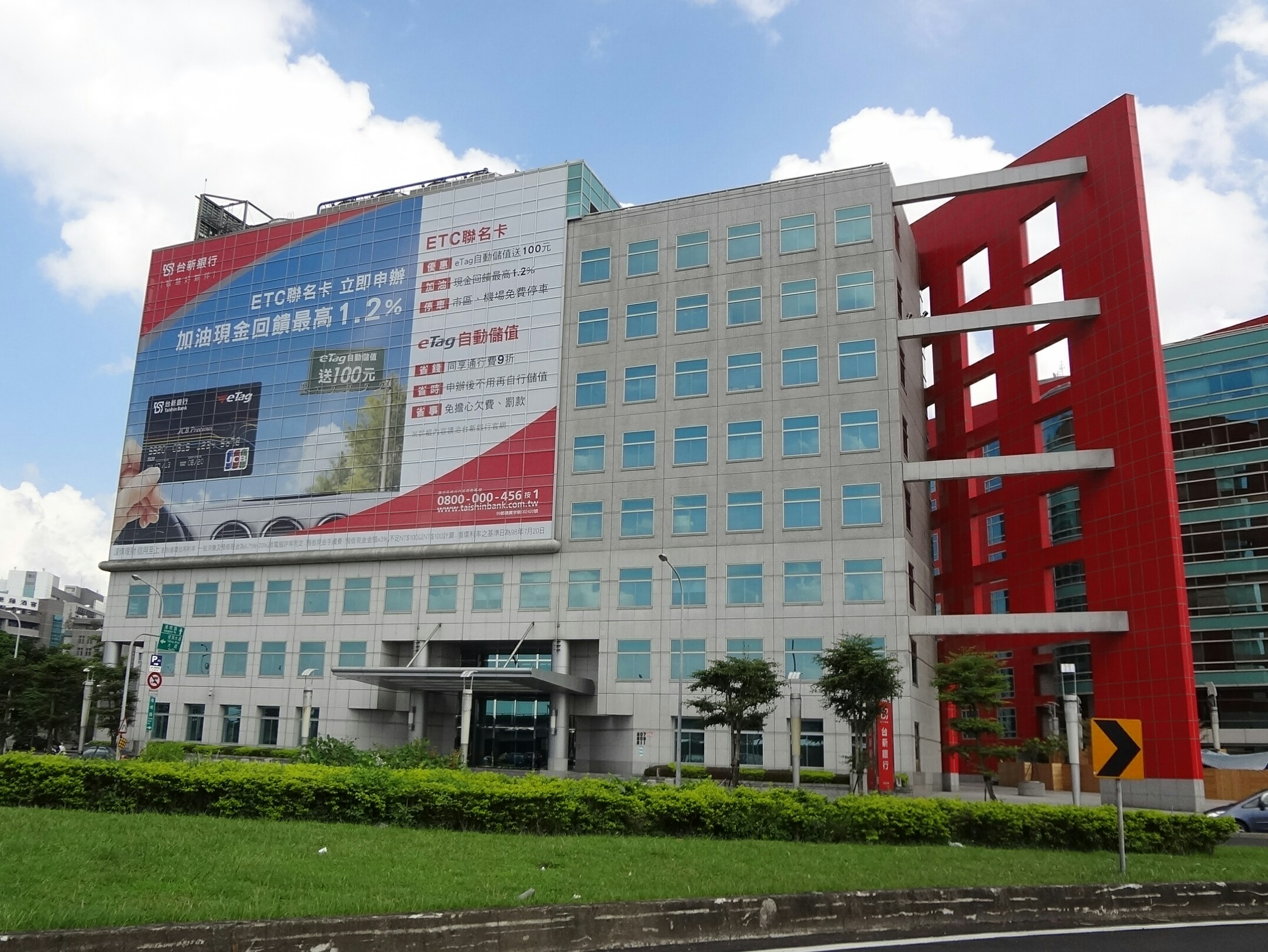 中文（台灣）: 台新銀行內湖大樓，地址：臺北市內湖區舊宗路二段207、209、211號。